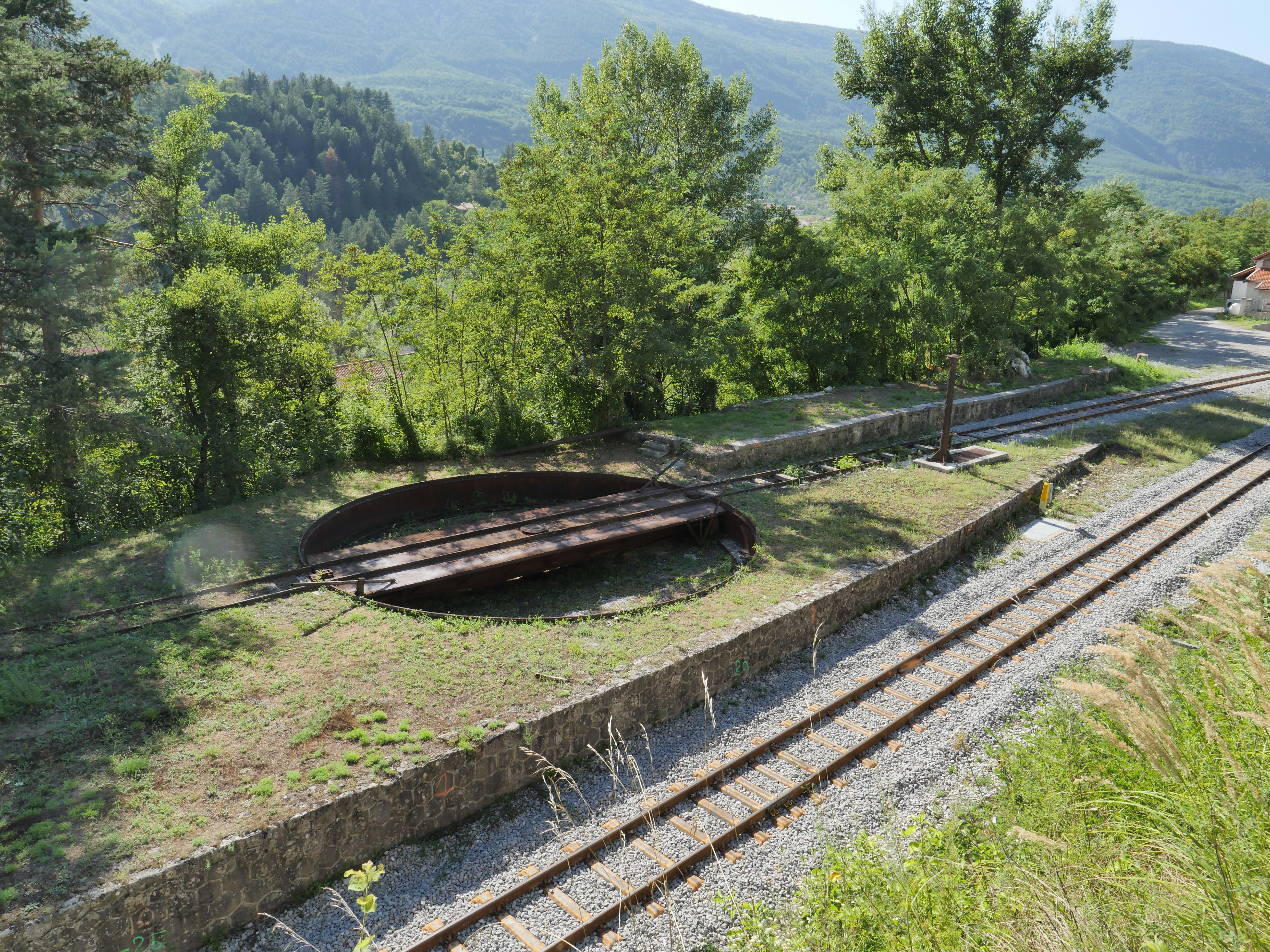 Plaque tournante fonctionnelle sur une voie en impasse de la gare d'Annot (ligne à voie métrique Nice-Digne)